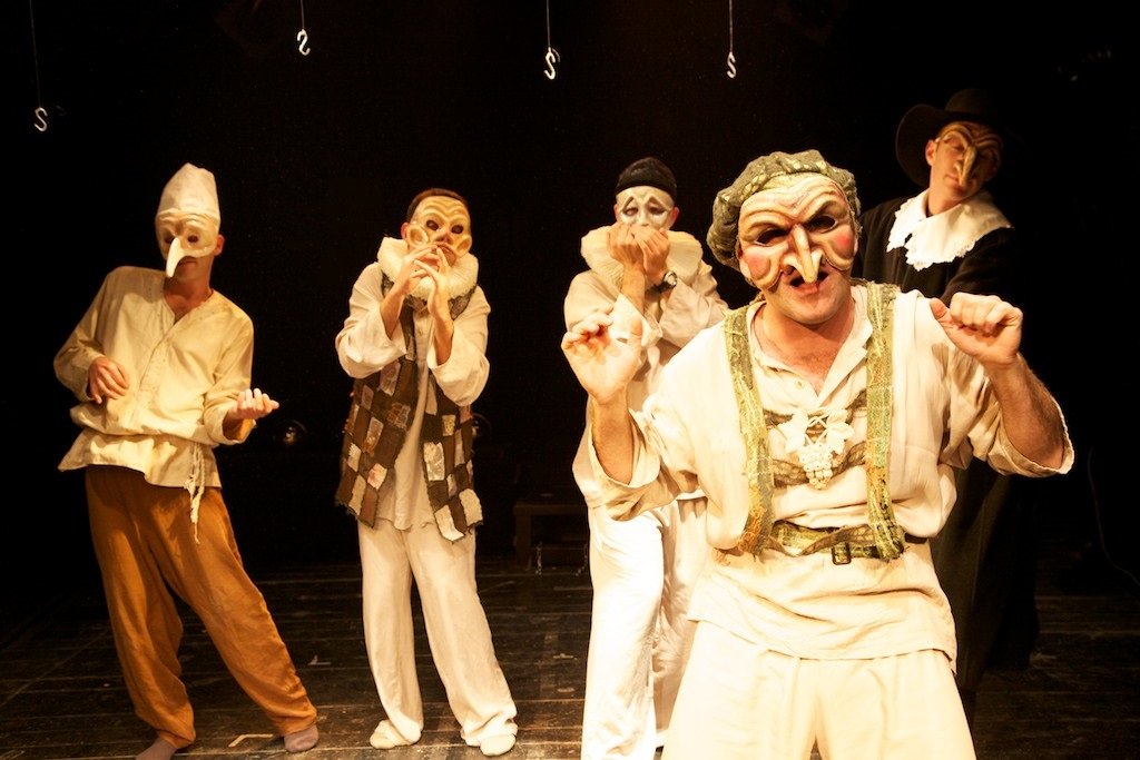 ההצגה "אגף 6", עפ"י אנטון צ'כוב, בבימויו של יפים קוצ'ר, בתיאטרון הסימטה, 2011